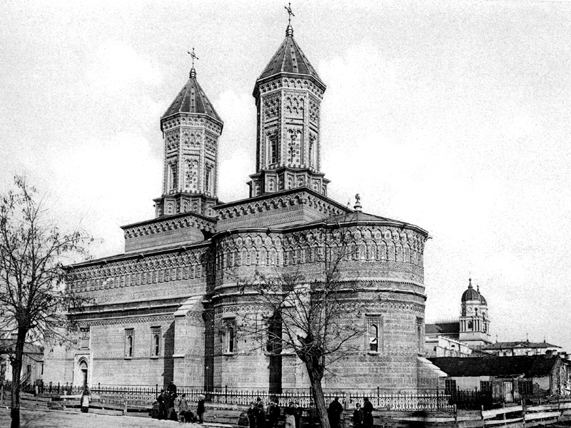 Trei Ierarhi Church, Iaşi